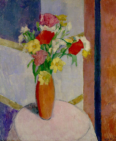 Blumenstillleben, Öl auf Leinwand, Privatbesitz